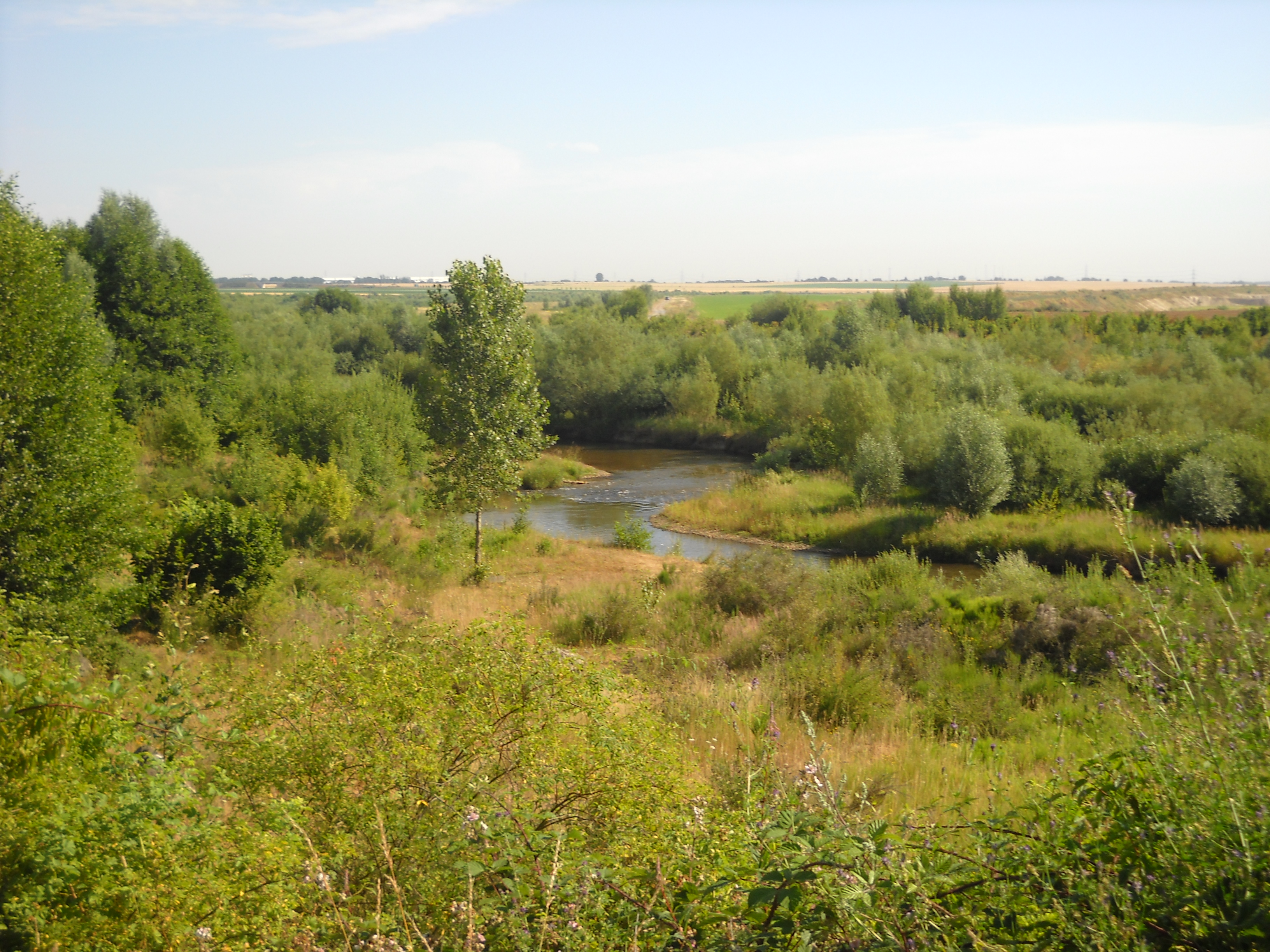 Rekultivierter Teil der Inde